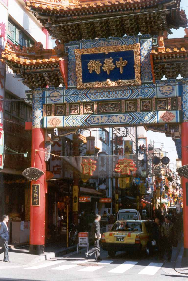 Chinatown (中華街 chūkagai) in Yokohama.